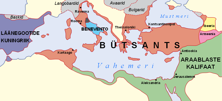 Bütsants (650)